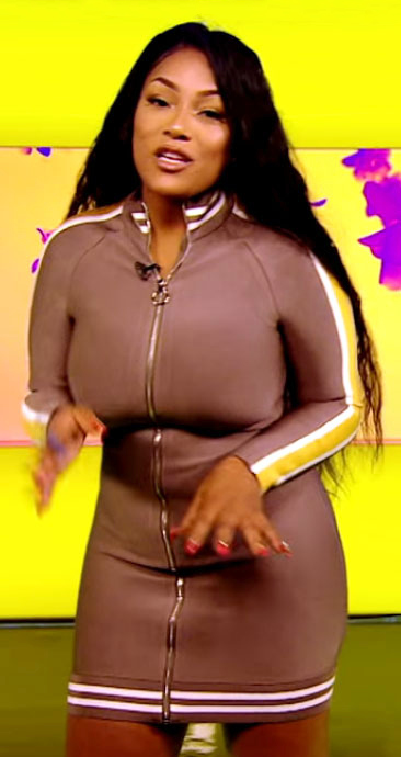 Stefflon Don en MTV